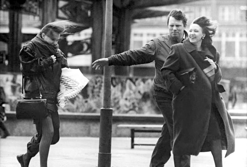 Berlin, Passanten im Wind ADN-ZB Hirschberger-8.2.1990 Berlin: In wahrer Aprillaune zeigte sich das Wetter. Innerhalb kurzer Zeit verdunkelten Wolken den blauen Himmel, Wind mit Spitzen von 20 Metern pro Sekunde und Regenschauer überraschten die Passanten. Dabei waren auch die Temperaturen ungewöhnlich: 15 Grad zeigte die Quecksilbersäule und erreichte damit den höchten Wert für einen 8. Februar in diesem Jahrhundert.